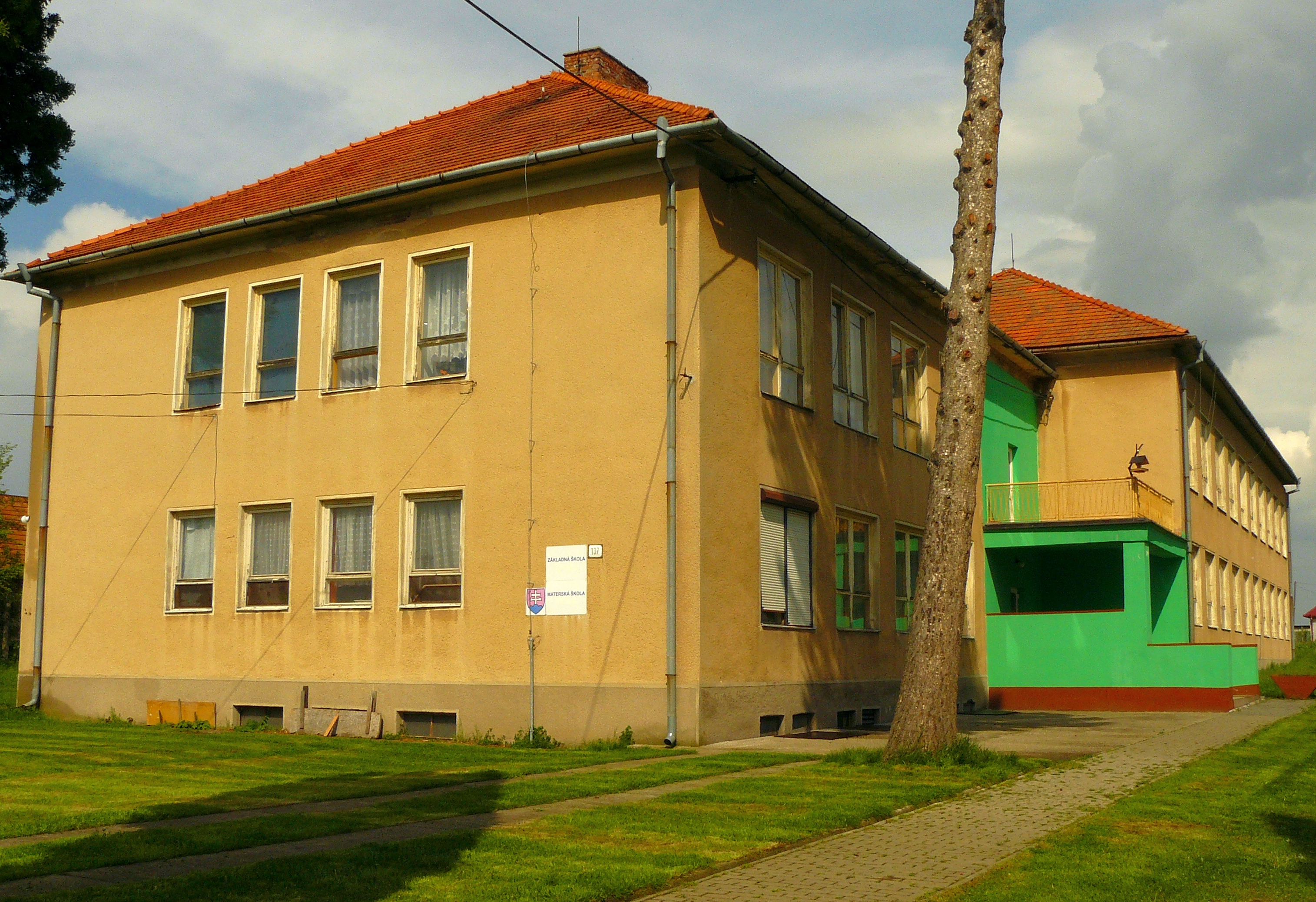 Csiffár